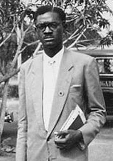 Patrice E. Lumumba; Congo prime minister, premier ministre congolais, kongolesischer Ministerpräsident